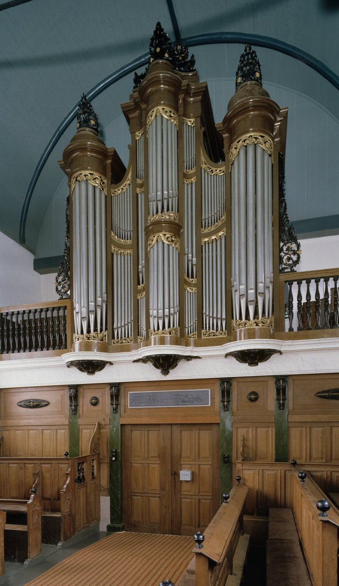 Nederlands Hervormde Kerk: Interieur, aanzicht orgel, orgelnummer 16 (opmerking: Gefotografeerd voor Het Historische Orgel in Nederland 1850-1858)